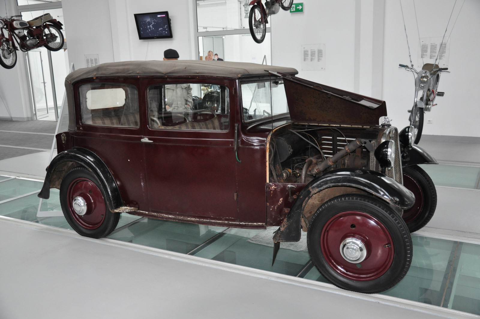 Samochód Stoewer V5, eksponowany w Muzeum Techniki i Komunikacji w Szczecinie